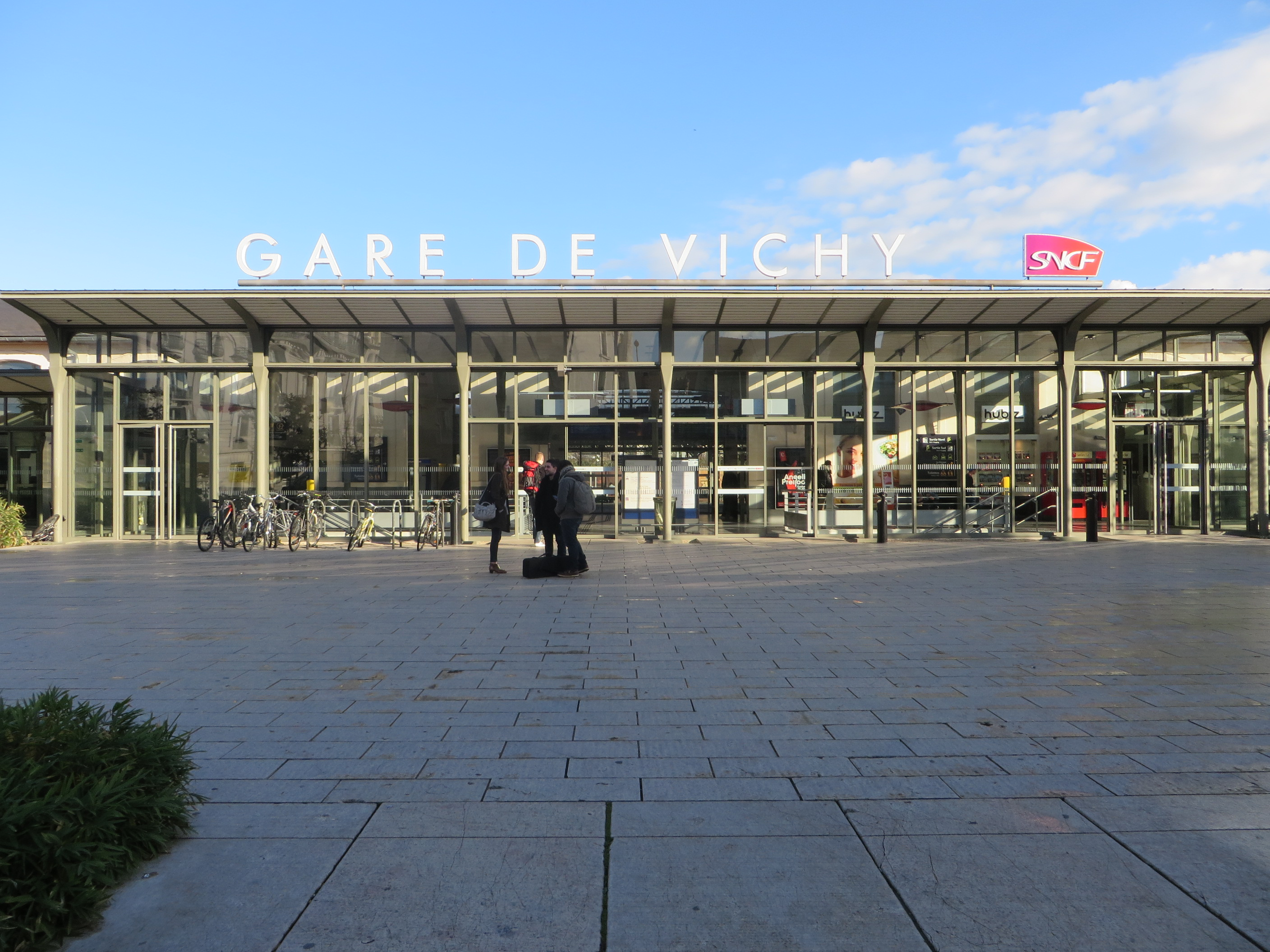 Bâtiment voyageurs de la gare de Vichy.